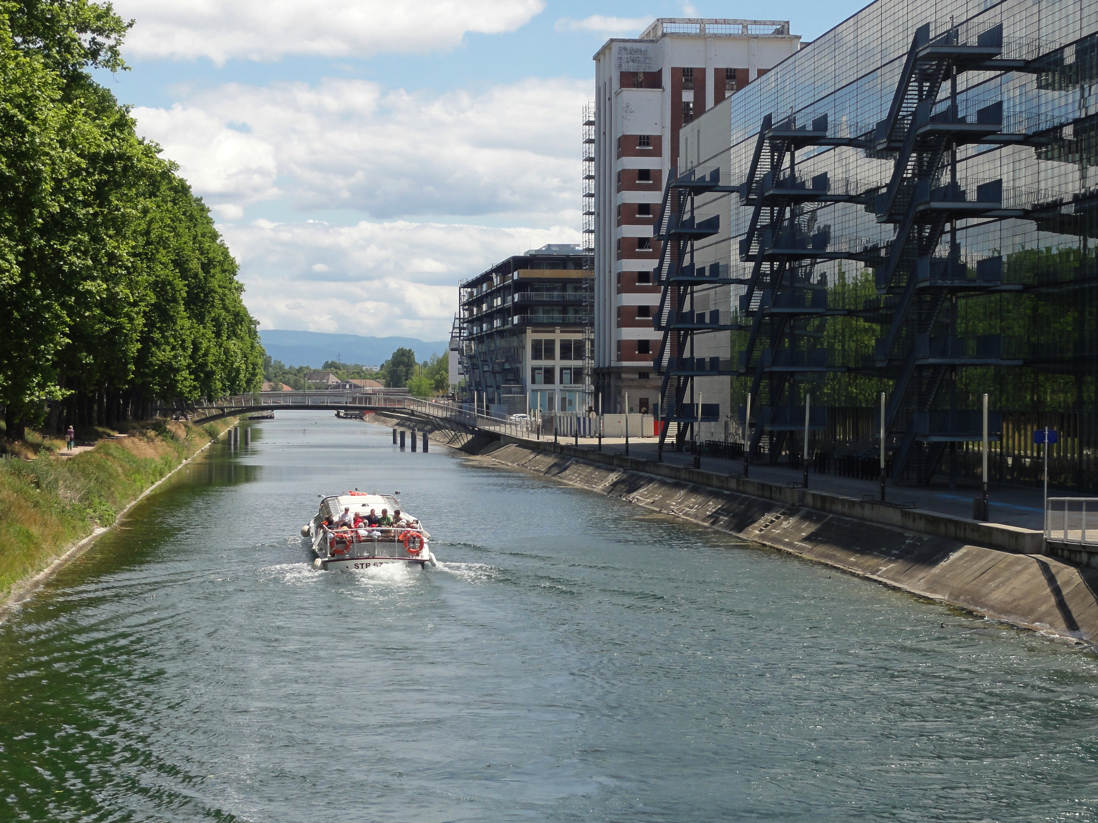 Alsace, Bas-Rhin, Strasbourg, Canal du Rhône au Rhin, Bassin d'Austerlitz.